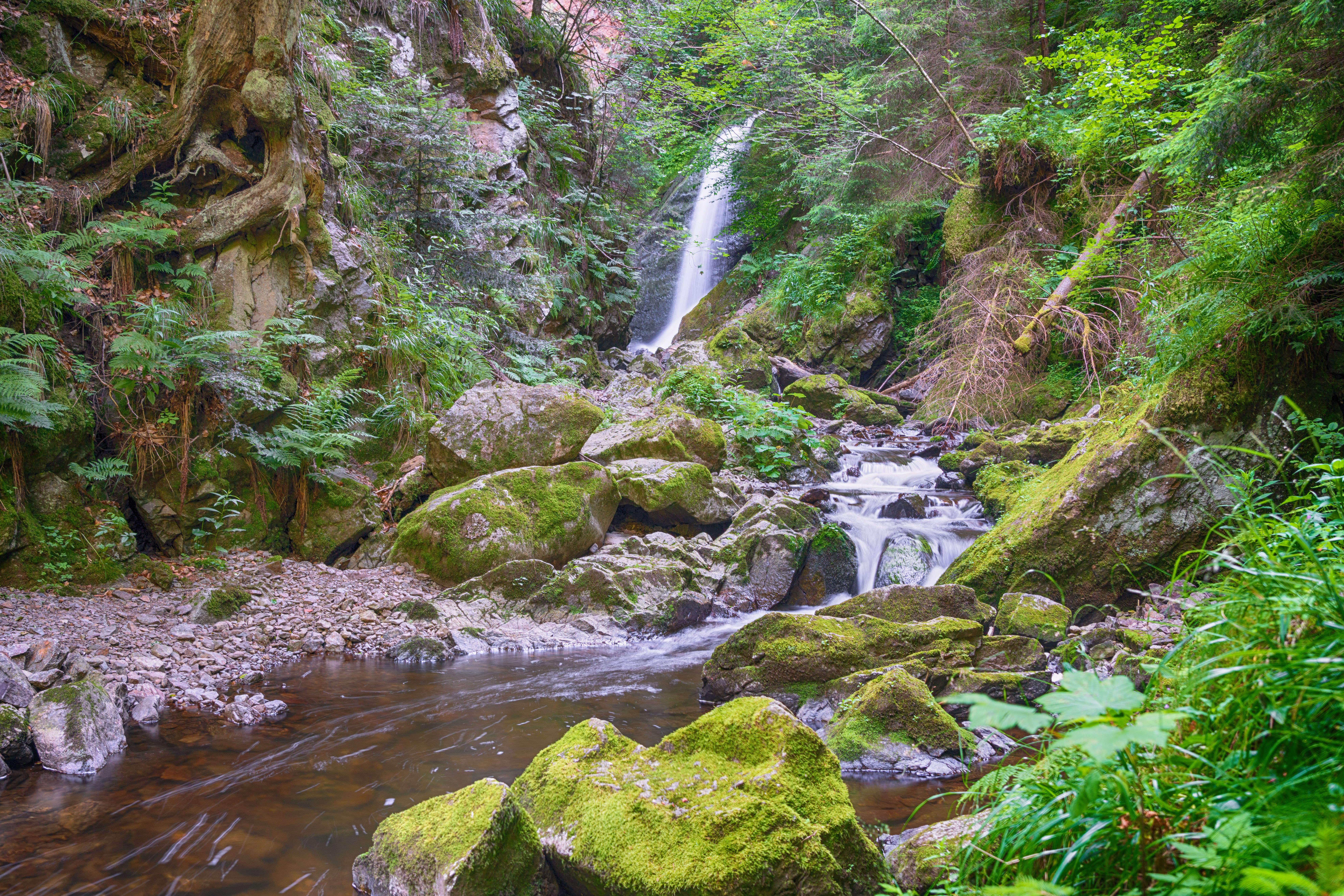 großer Ravenna Wasserfall in der Ravennaschlucht